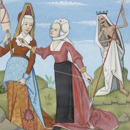 Moires, les trois divinités du Destin : Clotho, Lachésis et Atropos